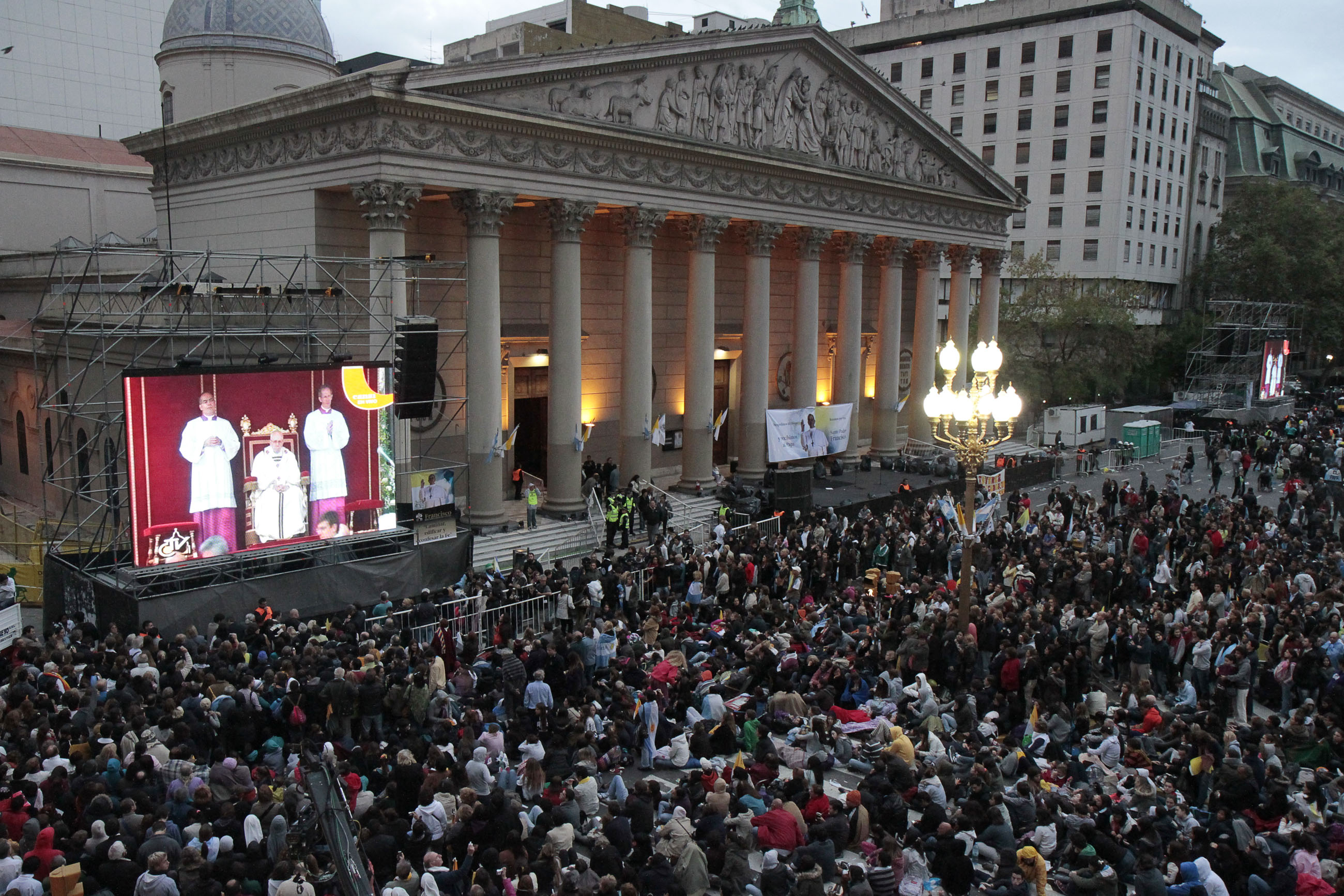 La multitud de fieles sigue atentamente la Santa Misa que se celebra en Roma como inicio del Pontificado de Francisco Fotos: mariana sapriza/GCBA